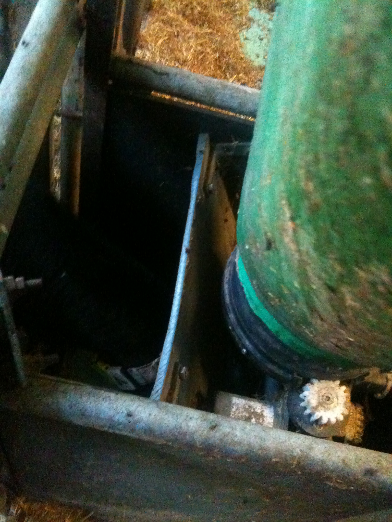 Transponderfütterung von Kälbern auf Haus Düsse